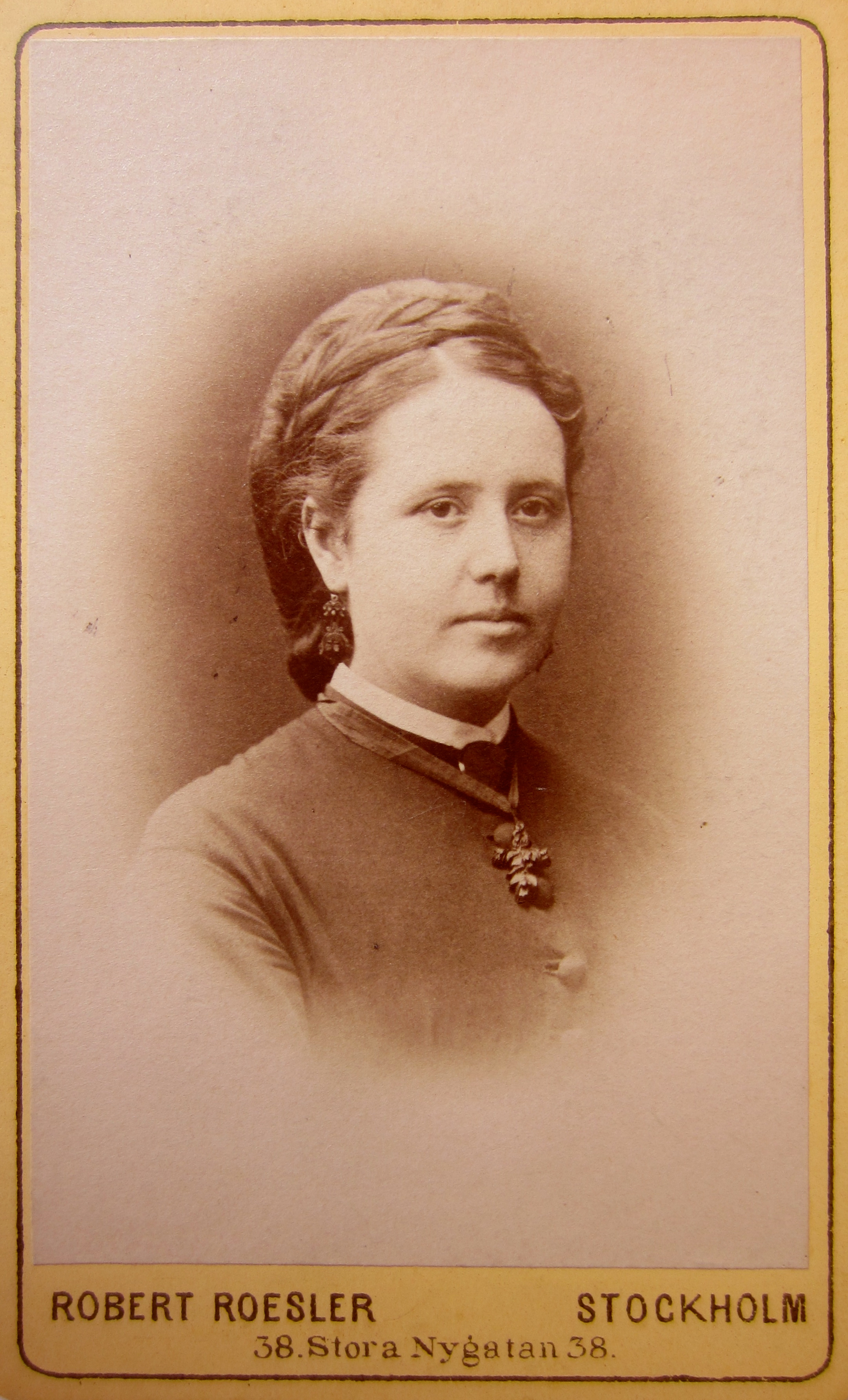 Augusta Abenius f. Elliot, HjS, Tom Söderbergs fotoarkiv 1-31, GUB